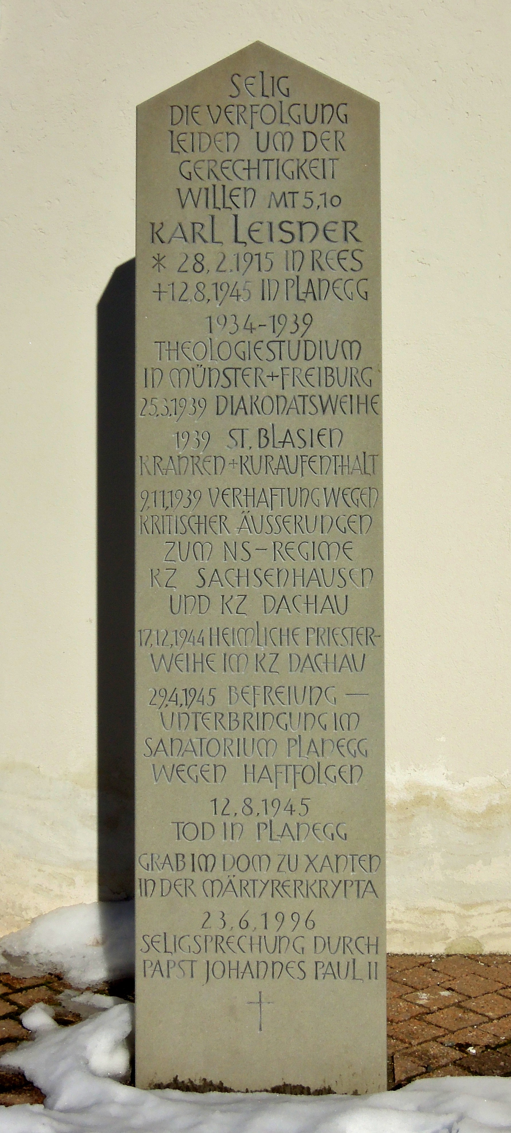 Inschrift an der Friedhofskapelle St. Blasien. Karl Leisner *28.2.1915 +12.8.1945 in Planegg